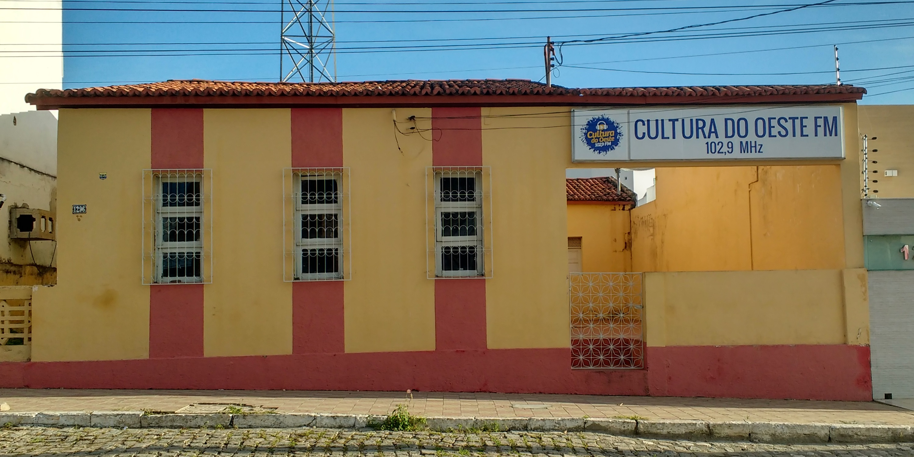 Emissora Rádio Cultura do Oeste, na Avenida Getúlio Vargas, centro de Pau dos Ferros, Rio Grande do Norte (Brasil).